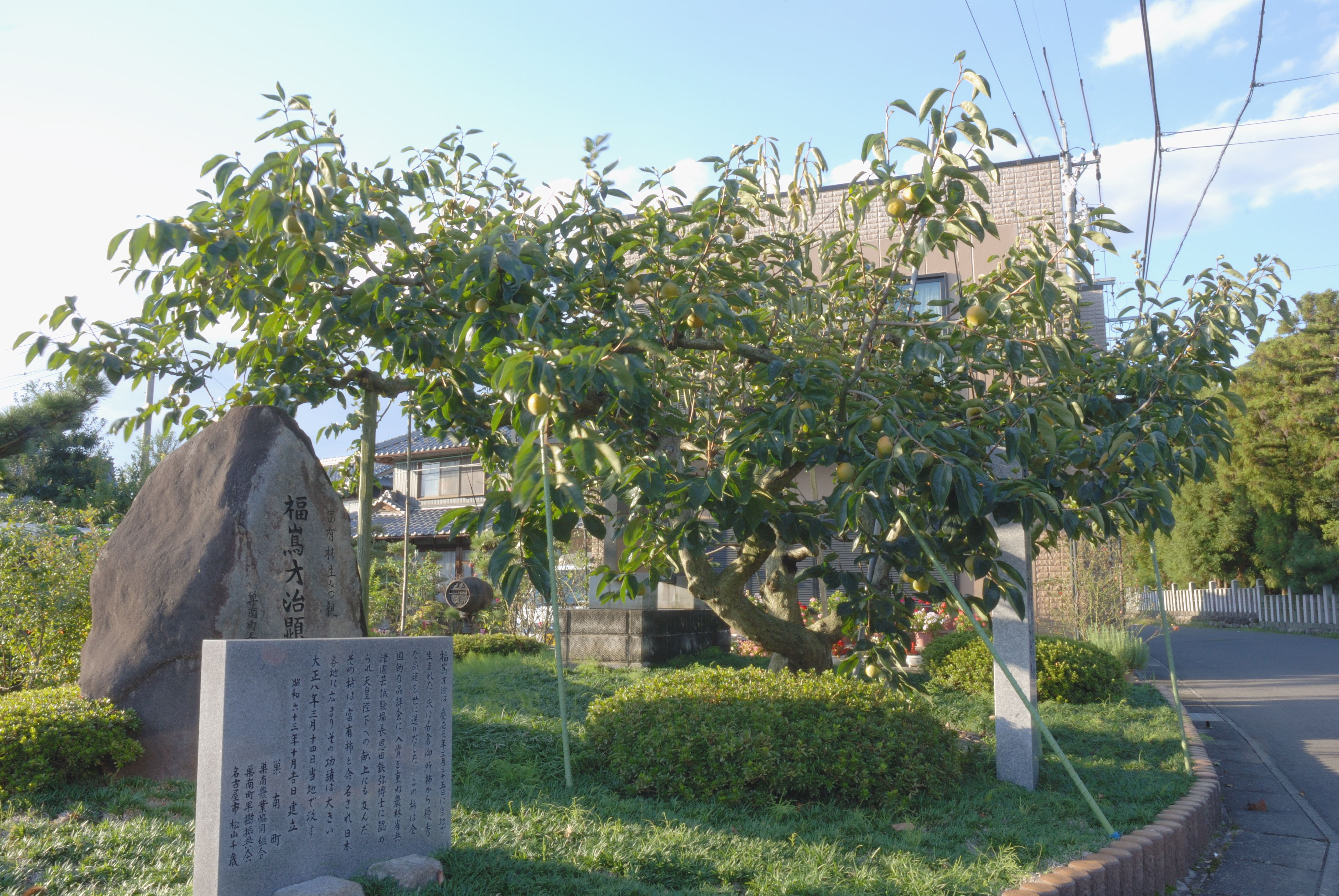 Fuyu genboku